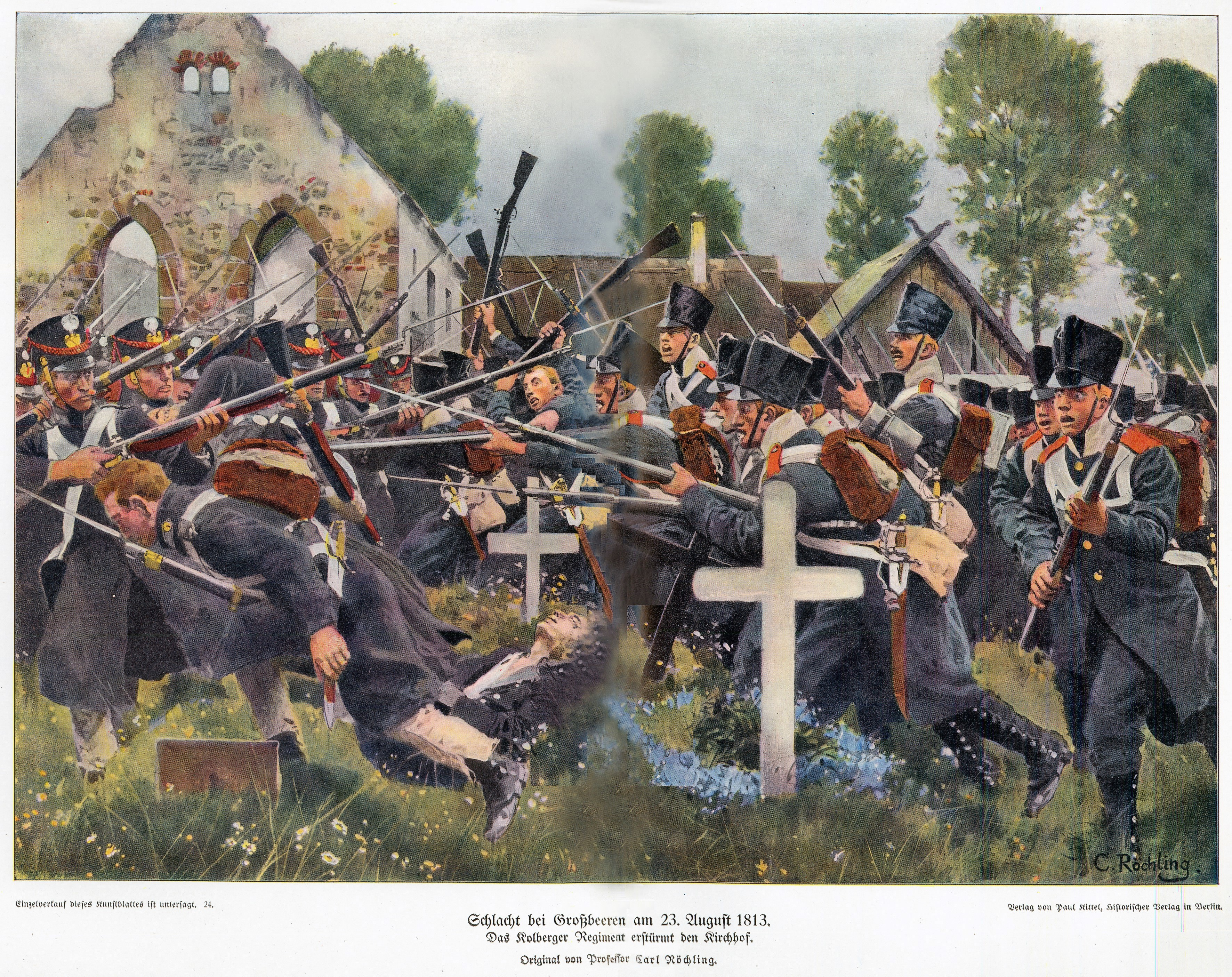 Gemälde der Schlacht bei Großbeeren am 23. August 1813.Anmerkung: Im Hintergrund ist die Feldstein-Dorfkirche von Großbeeren zu sehen, die allerdings bereits im Siebenjährigen Kriege 1760 durch russische Truppen zerstört worden war und nun noch mehr litt. Zum Andenken an die Schlacht ließ der preußische König Friedrich Wilhelm III. 1818-20 durch Karl Friedrich Schinkel an ihrer Stelle eine neogotische Kirche errichten. Im Buch geht die Abbildung über beide Seiten, so dass beim Scan ein Schattenwurf in der Mitte (Buchfalz) unvermeidbar war, der mit Photoshop zu mildern versucht wurde.